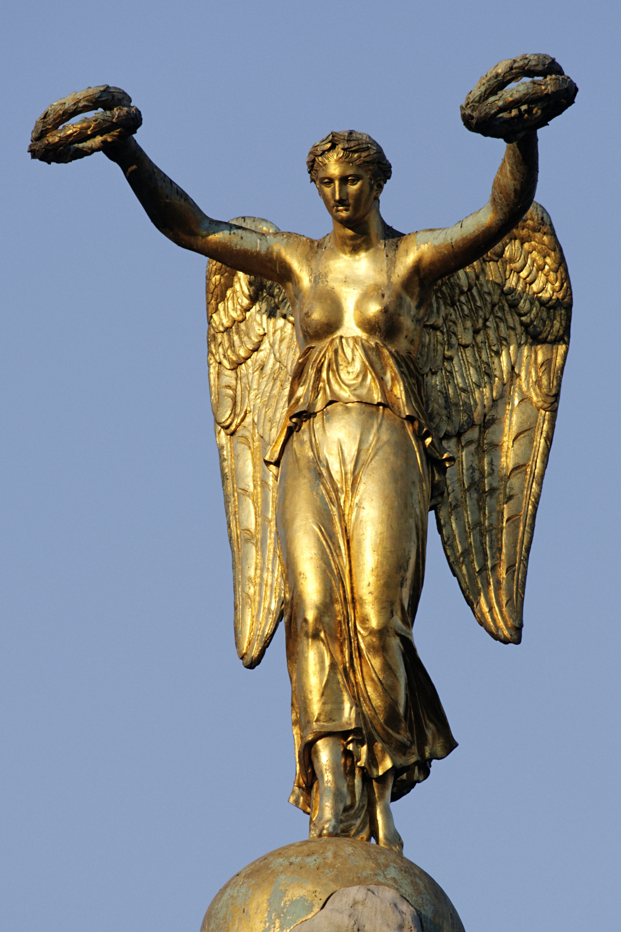 Victoire par Louis-Simon Boizot (1743-1809), bronze doré, copie de l'original aujourd'hui dans le jardin du musée Carnavalet.